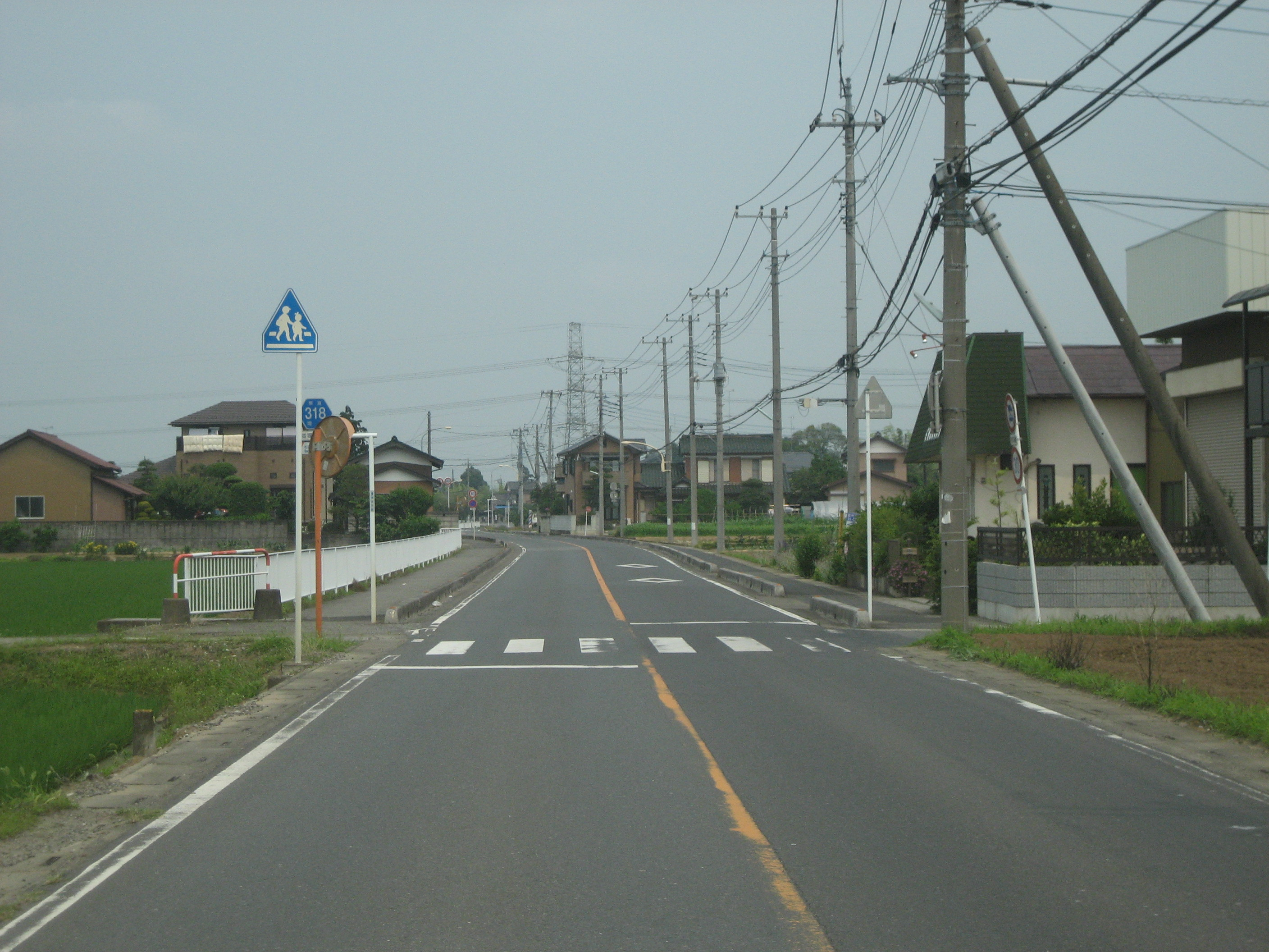 埼玉県道318号線杉戸町内